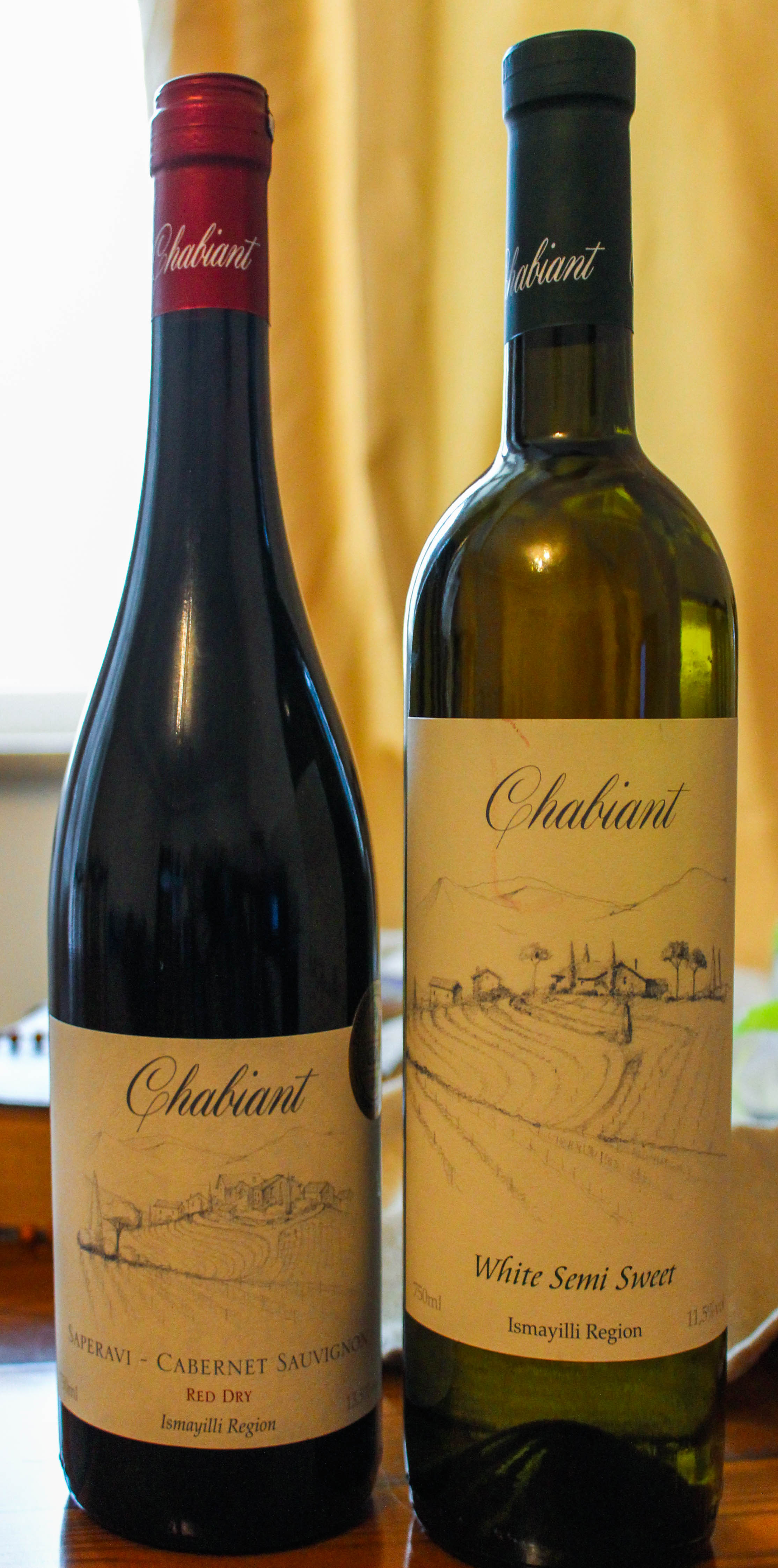 Chabiant Azerbaijani wine from Chateu Monolit